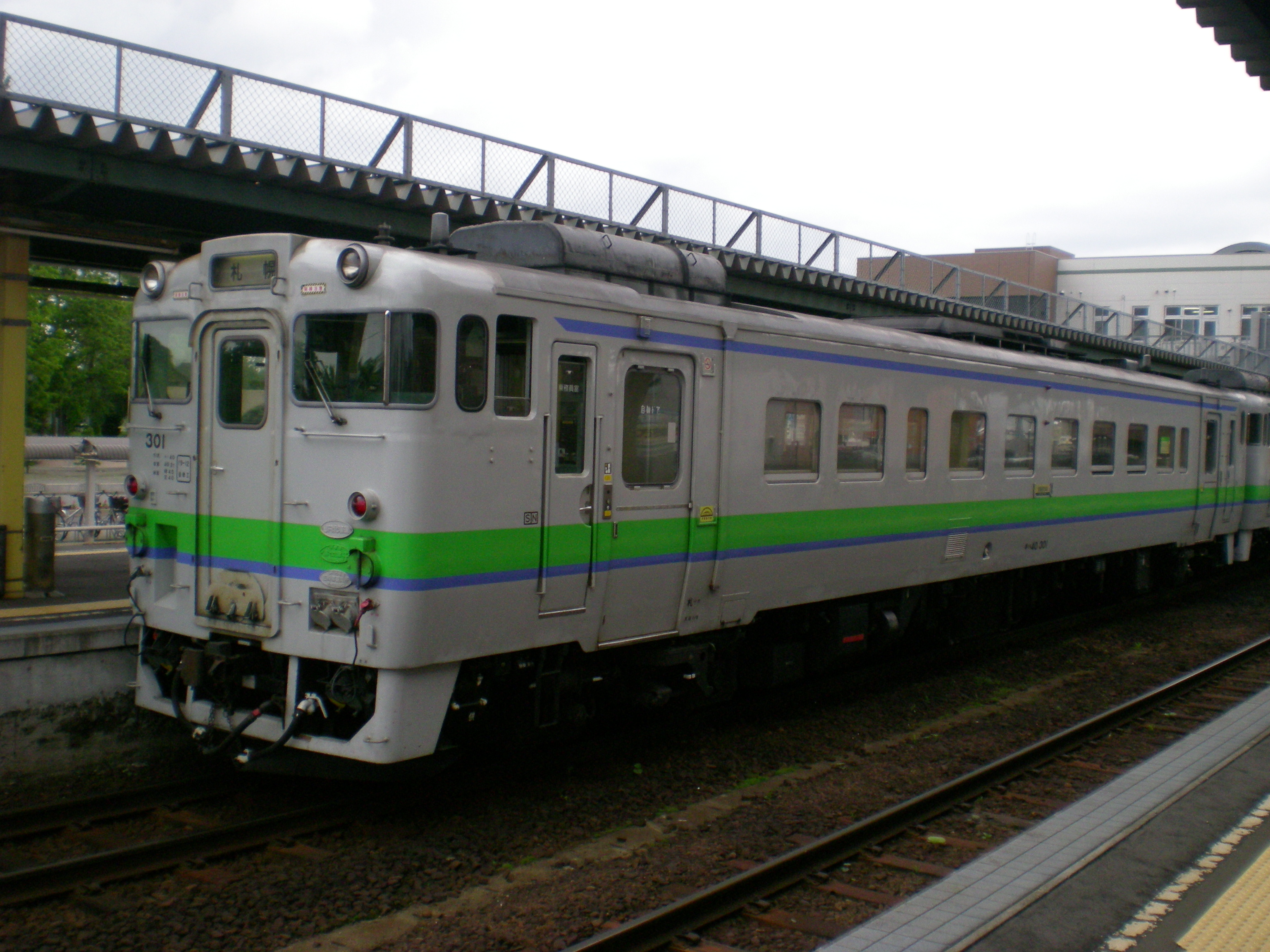 JR北海道キハ40形気動車（キハ40 301）JR北海道札沼線、石狩当別駅で撮影